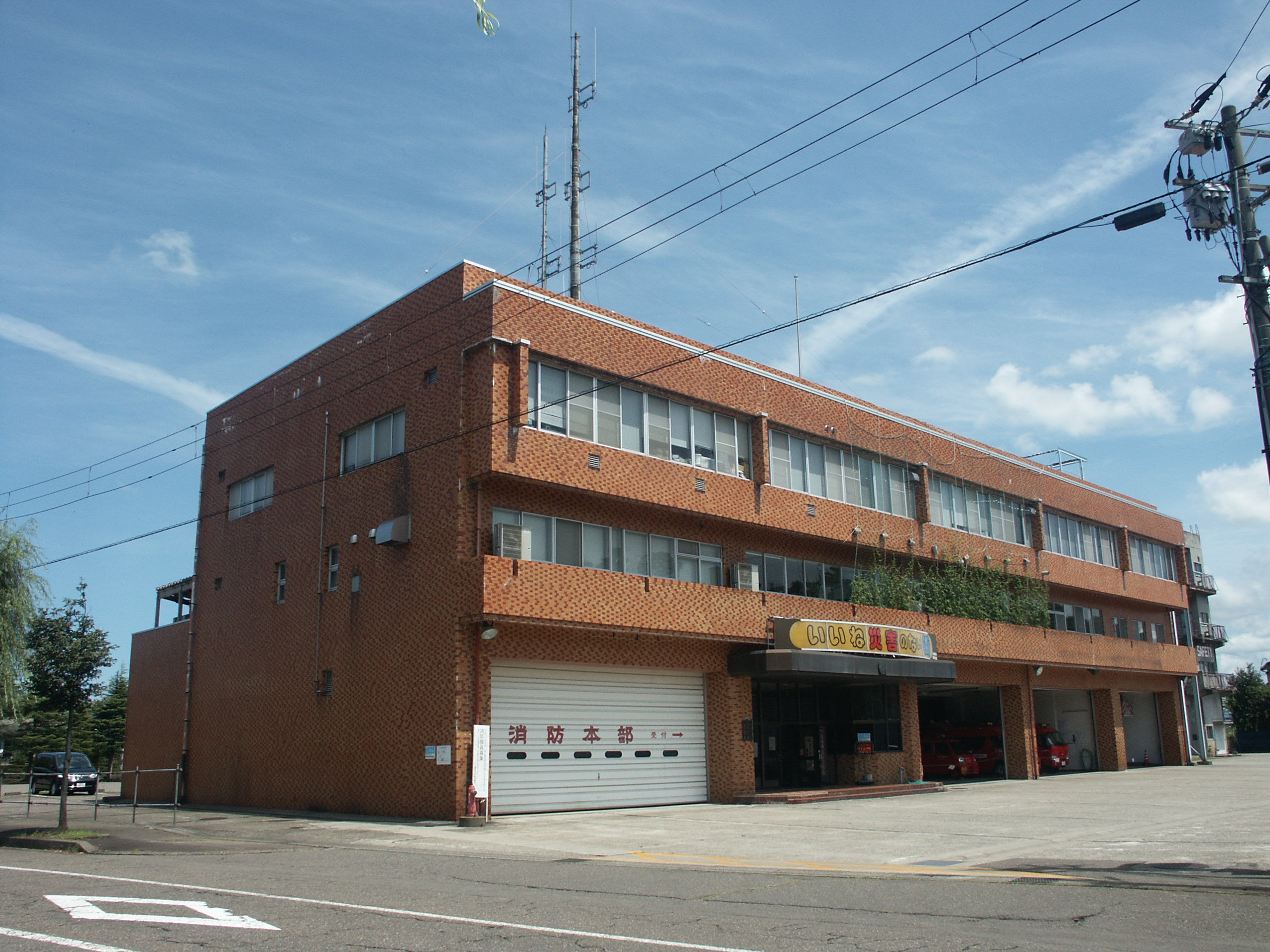 上越地域消防事務組合消防本部・上越南消防署庁舎